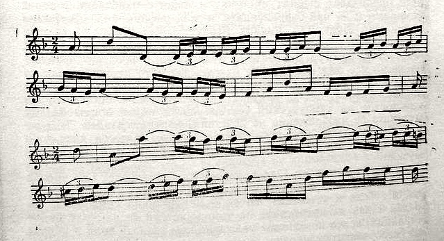 Изкуството на фугата на Йохан Себастиан Бах; пример за инверсия в две от фугите